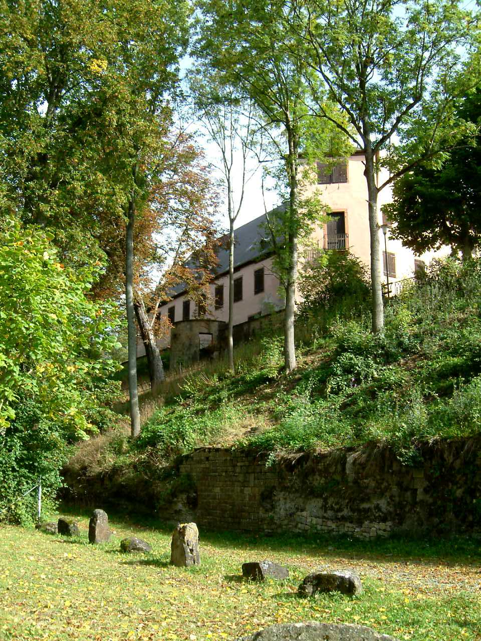 Schloß Greifenstein (Bonnland), Südwestansicht